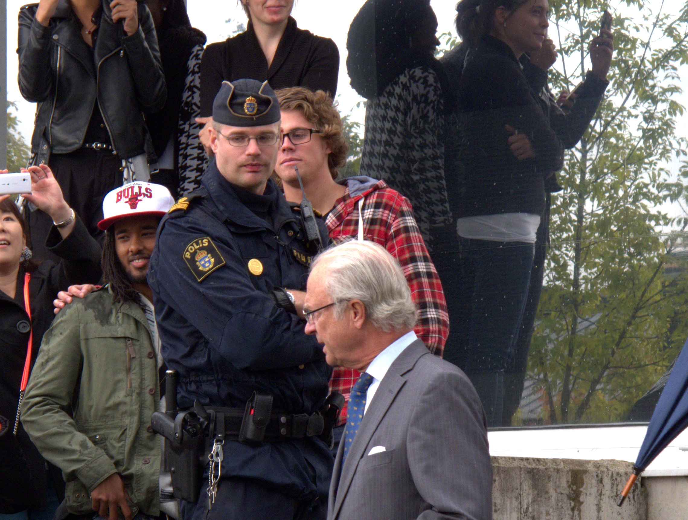 Kung Carl XVI Gustaf besöker Högskolan Dalarna under skydd av polisinspektör med särskild tjänsteställning.